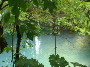 La Source Bleue (The Blue Source), à Touzac, Lot, France.